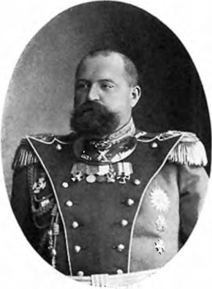 Граф Никола́й Никола́евич Игна́тьев (1872—1962) — русский генерал-майор, командир Преображенского полка, герой Первой мировой войны.